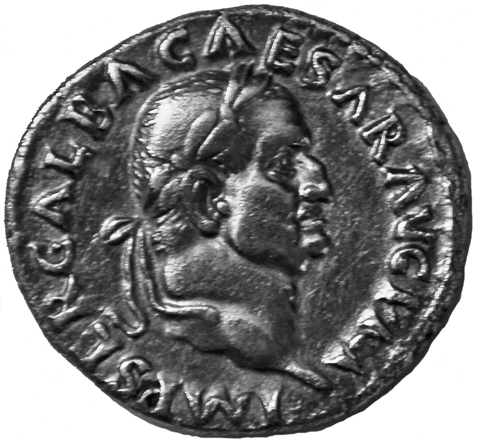 Denar des Galba IMP SER GALBA CAESAR AVG P M